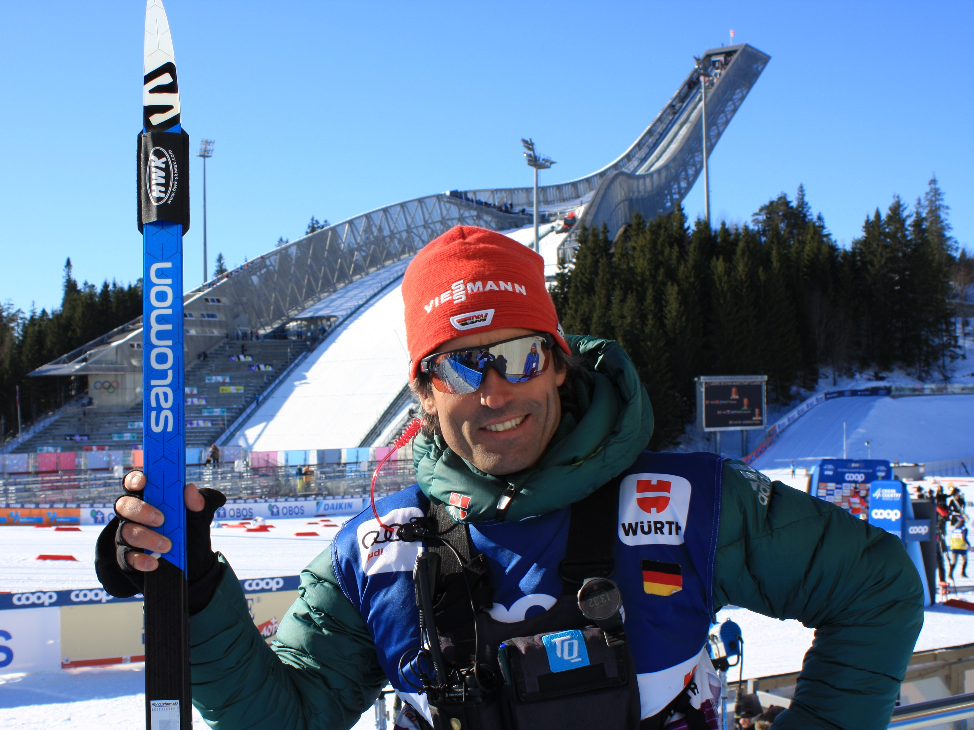 Peter Schlickenrieder, Holmenkollen, 10.03.2019